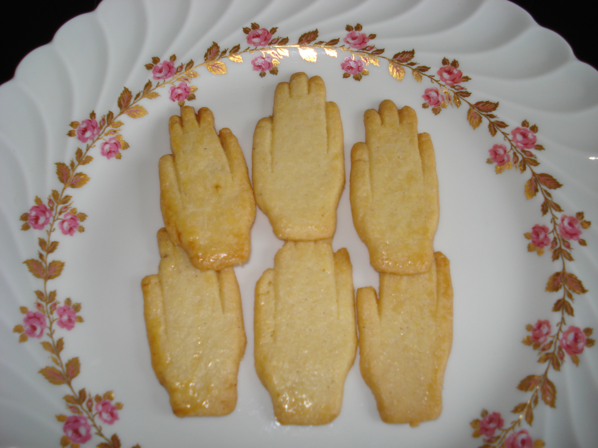 Belgische keuken; koekjes